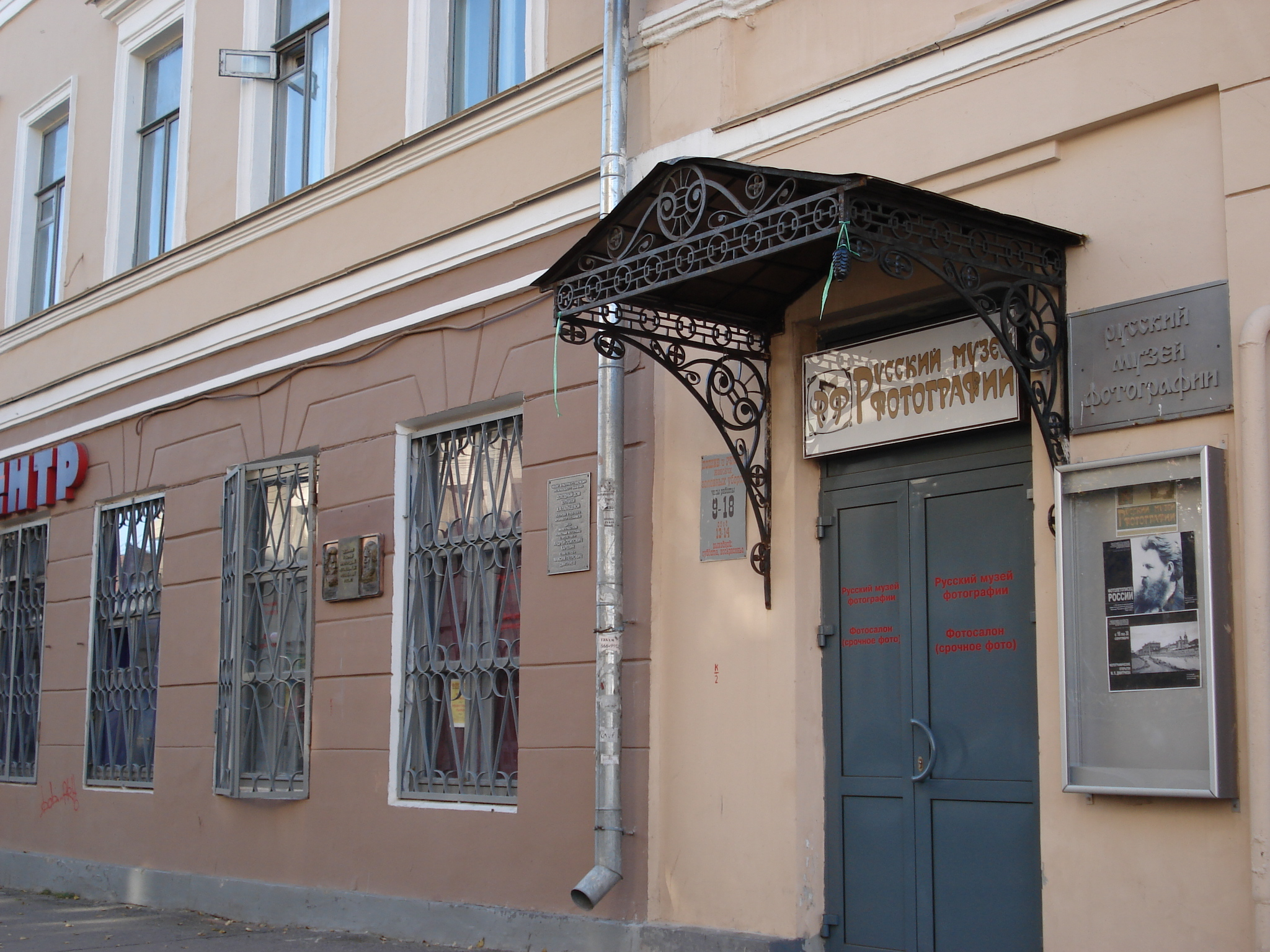 Русский музей фотографии / Russian Museum of Photography / Musée russe de la photographie